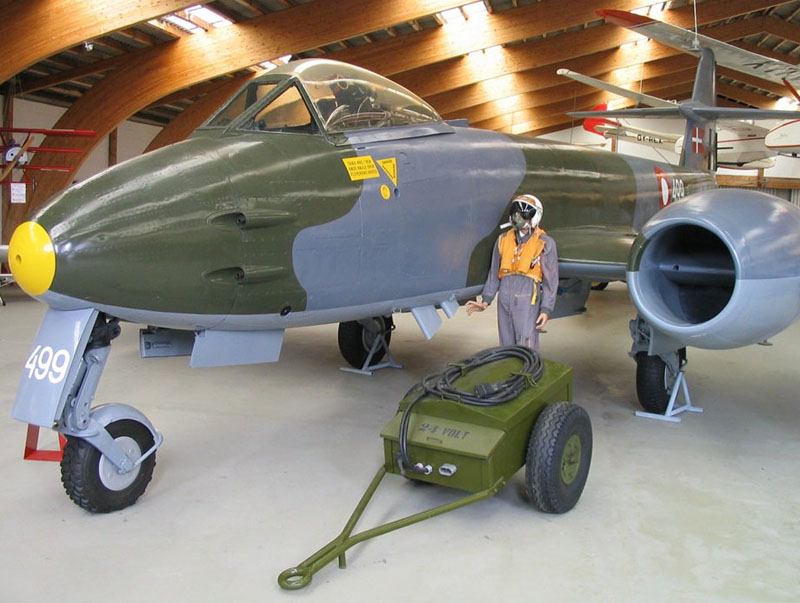 Gloster Meteor - Aircraft museum Stauning, Denmark